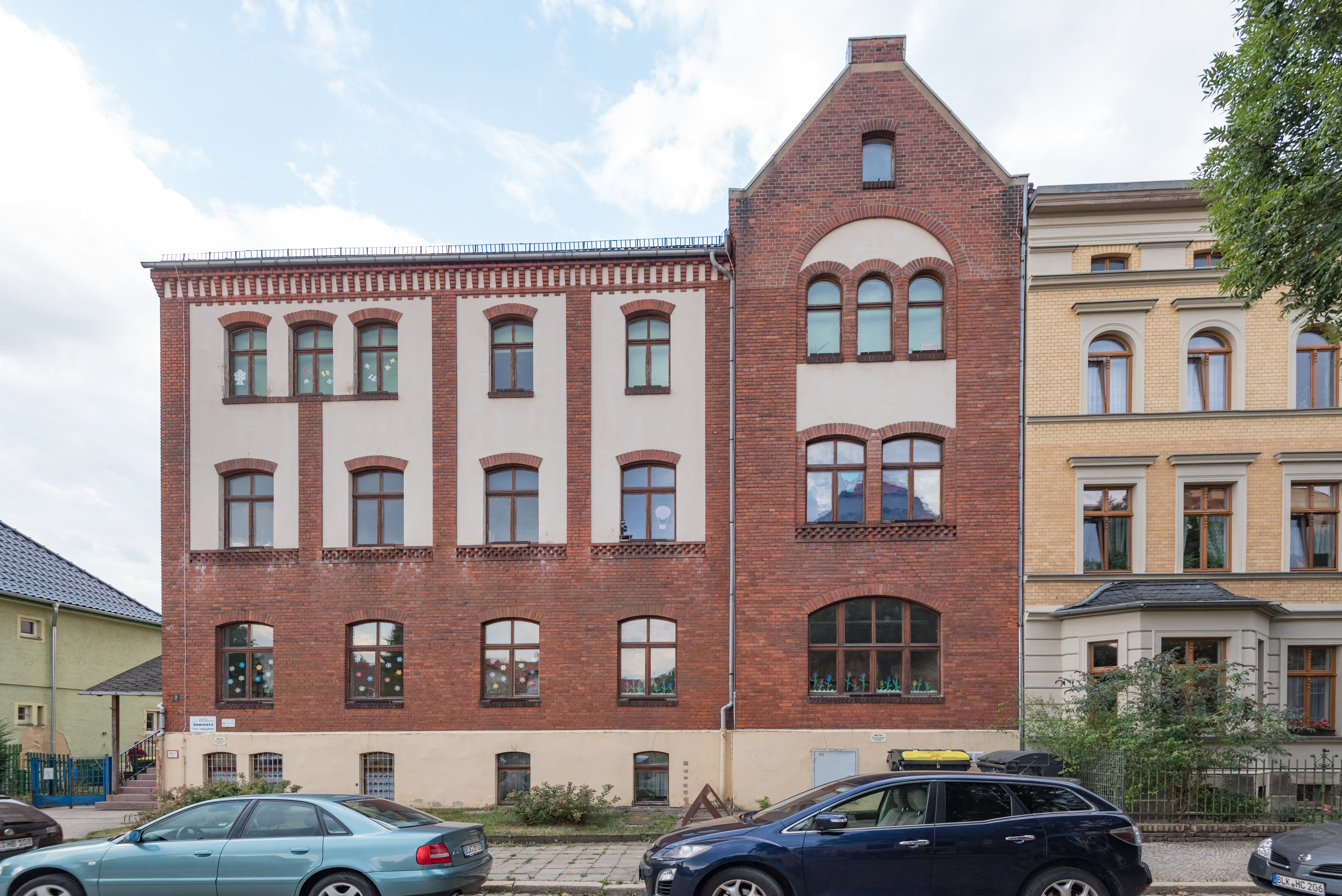 Naumburg (Saale), Theodor-Körner-Straße 7